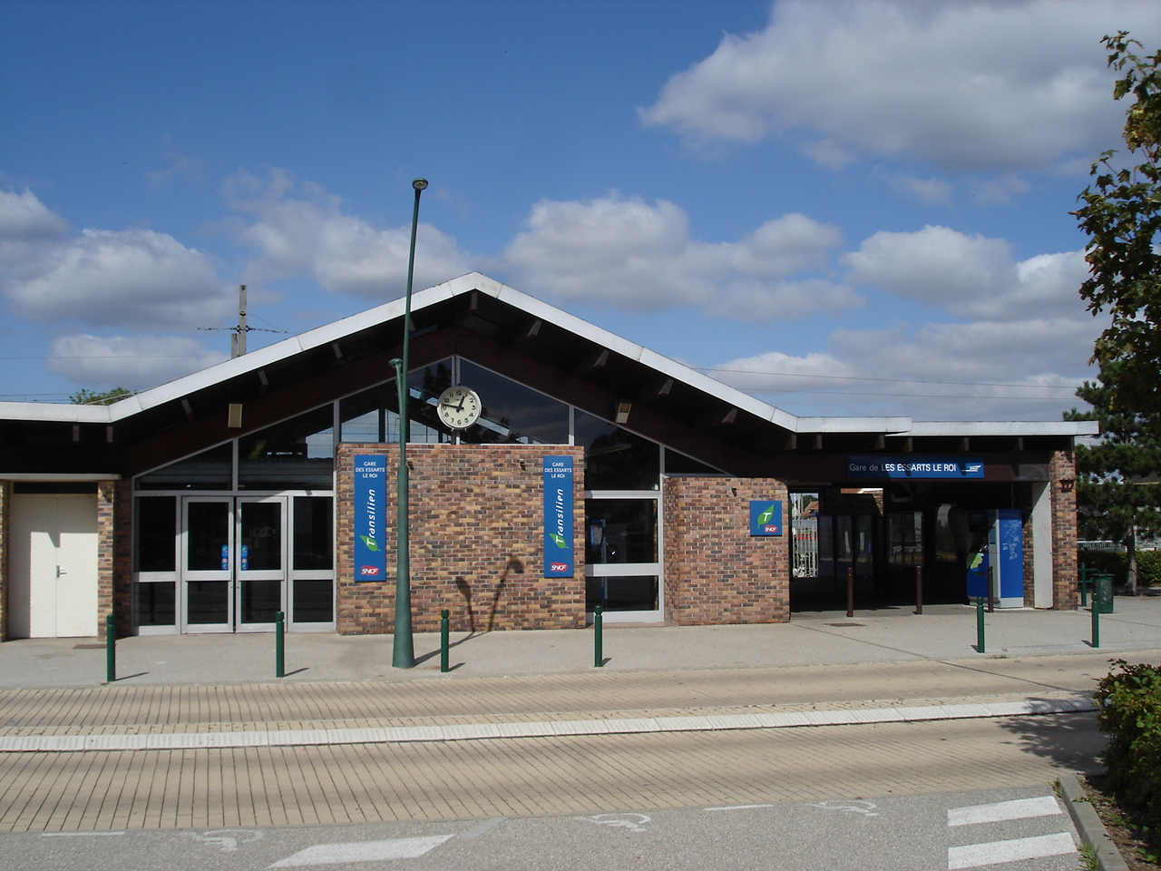 Gare des Essarts-le-Roi (78) : Le bâtiment voyageurs.